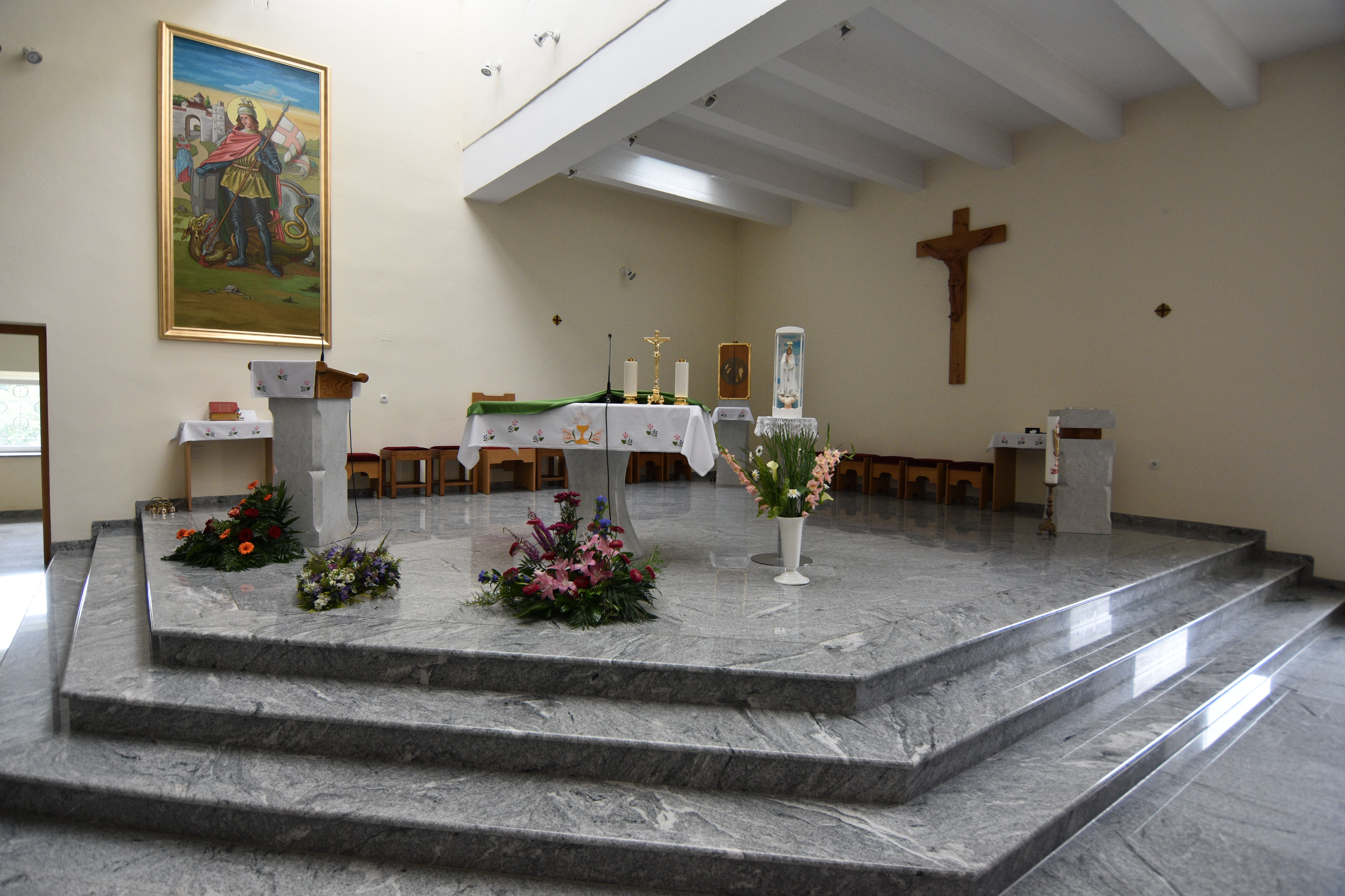 Župnijska cerkev sv. Jurija (Videm) - Interior